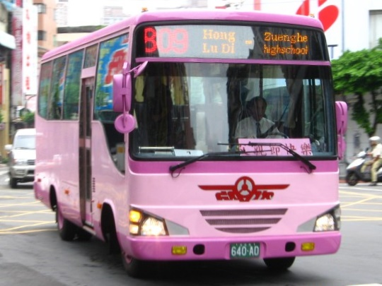 欣欣客運640-AD，行駛台北縣轄市區公車809正線。